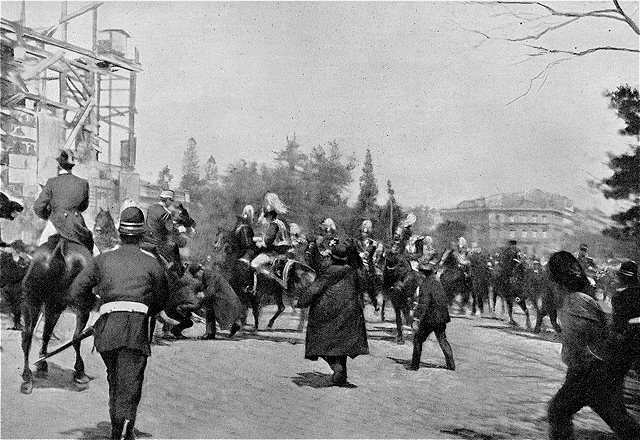 "Instantané pris au moment où l'auteur de l'attentat, Rafaël Sanchez Alegre, après avoir tiré deux coups de revolver sur le roi sans l'atteindre mais en blessant son cheval, est terrassé par l'agent de la Sûreté Guijarro, mais tire encore un troisième coup de revolver qui blesse cet agent à la cuisse. Un des aides de camp à cheval (vu de profil sur la photographie) s'est jeté entre l'assassin et le souverain."